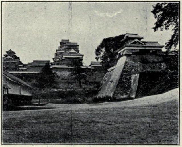 熊本城 明治時代